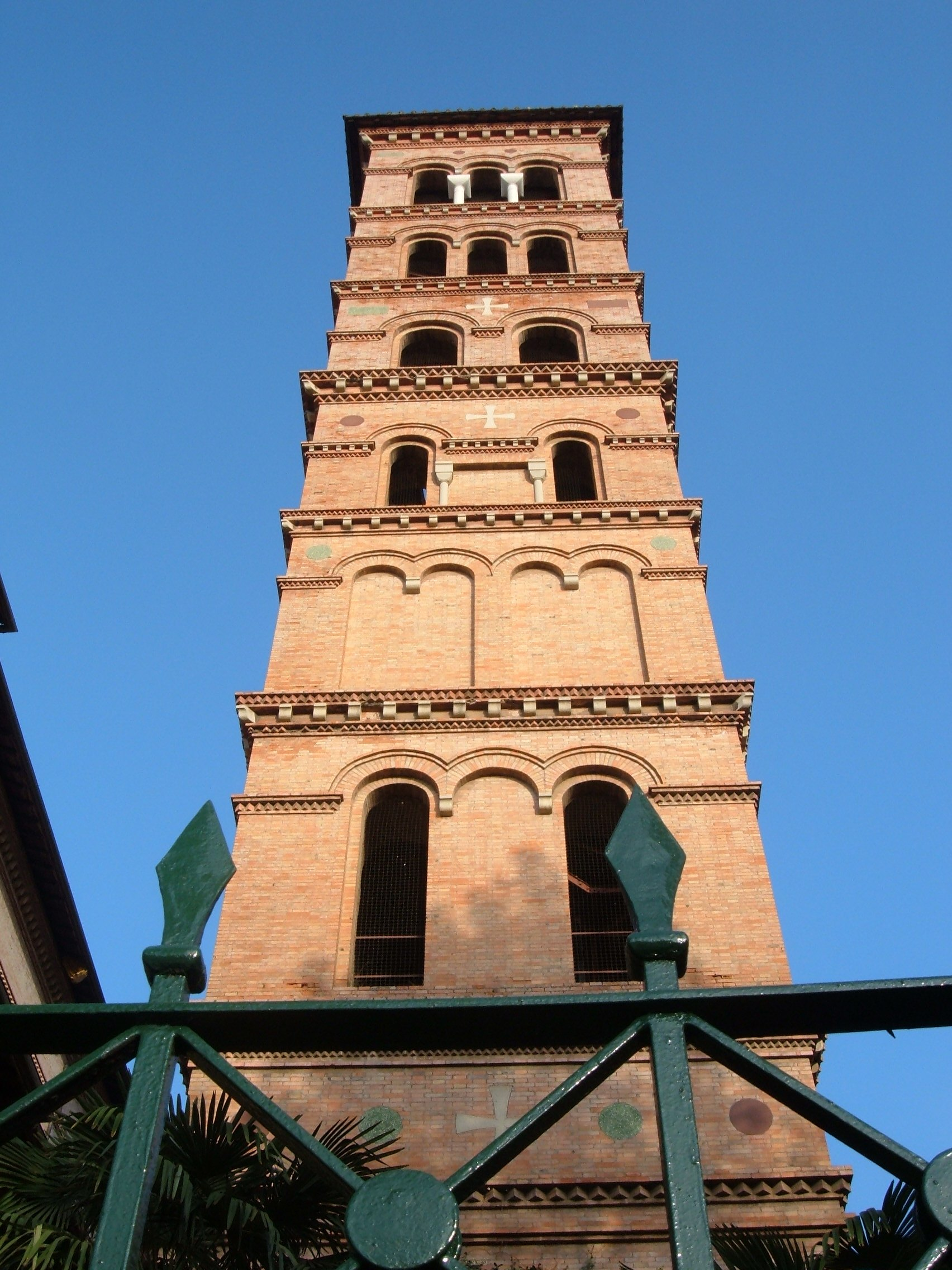 Basilica di Santa Croce a Via FLaminia, a Roma, nel quartiere Flaminio.